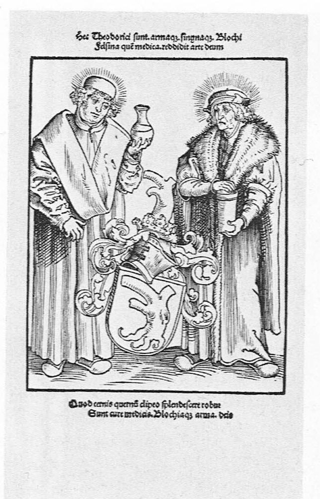 Exlibris des Dr. med. Dietrich Bloch